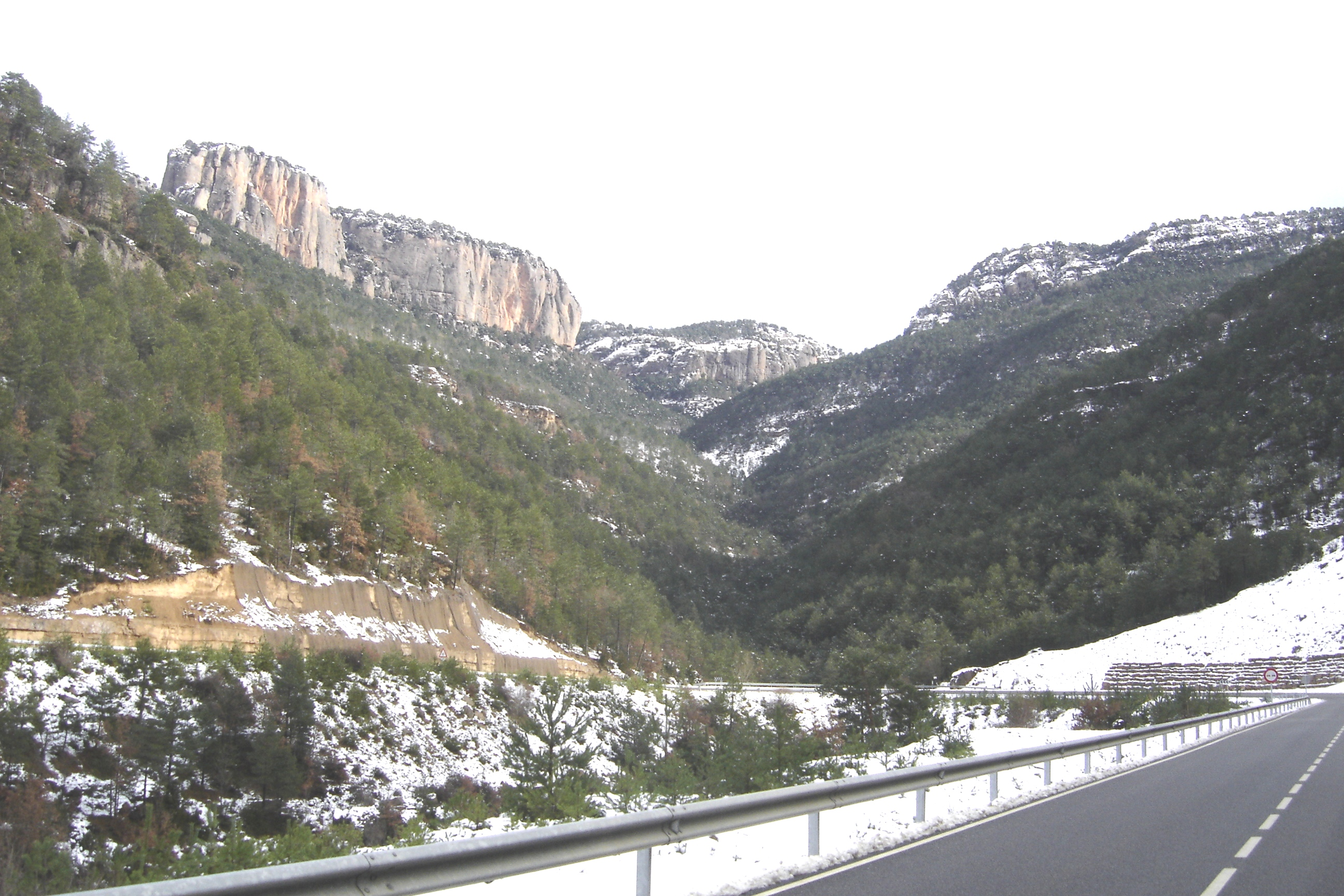 La Rasa de les Cases de Posada (Navès, Solsonès) vista des de la ctra de Solsona a Sant Llorenç de Morunys. A l'esquerra, el Capolatell de Busa.